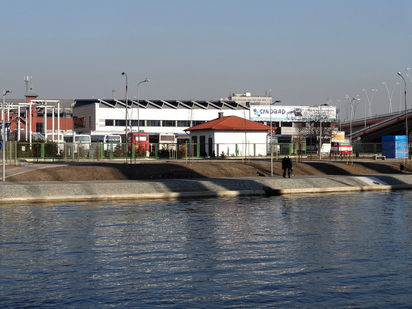 Dworzec główny PKS w Bydgoszczy - widok od Brdy